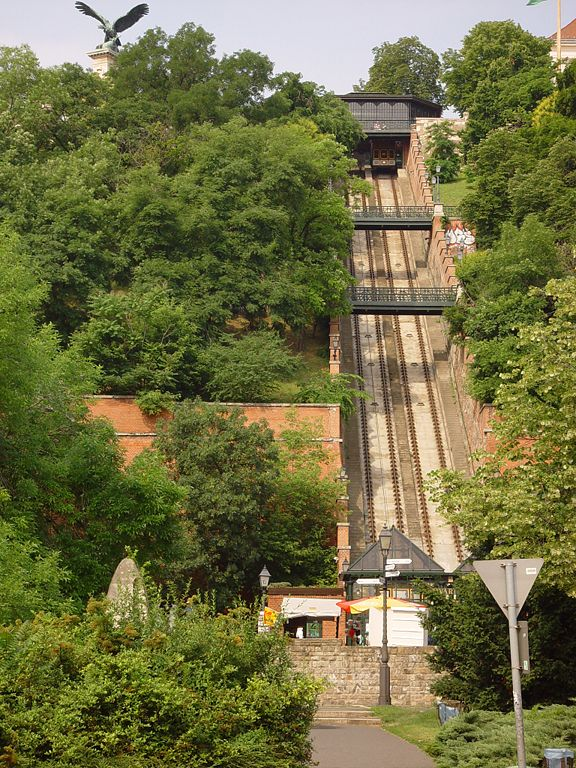 Sénye kápolnája